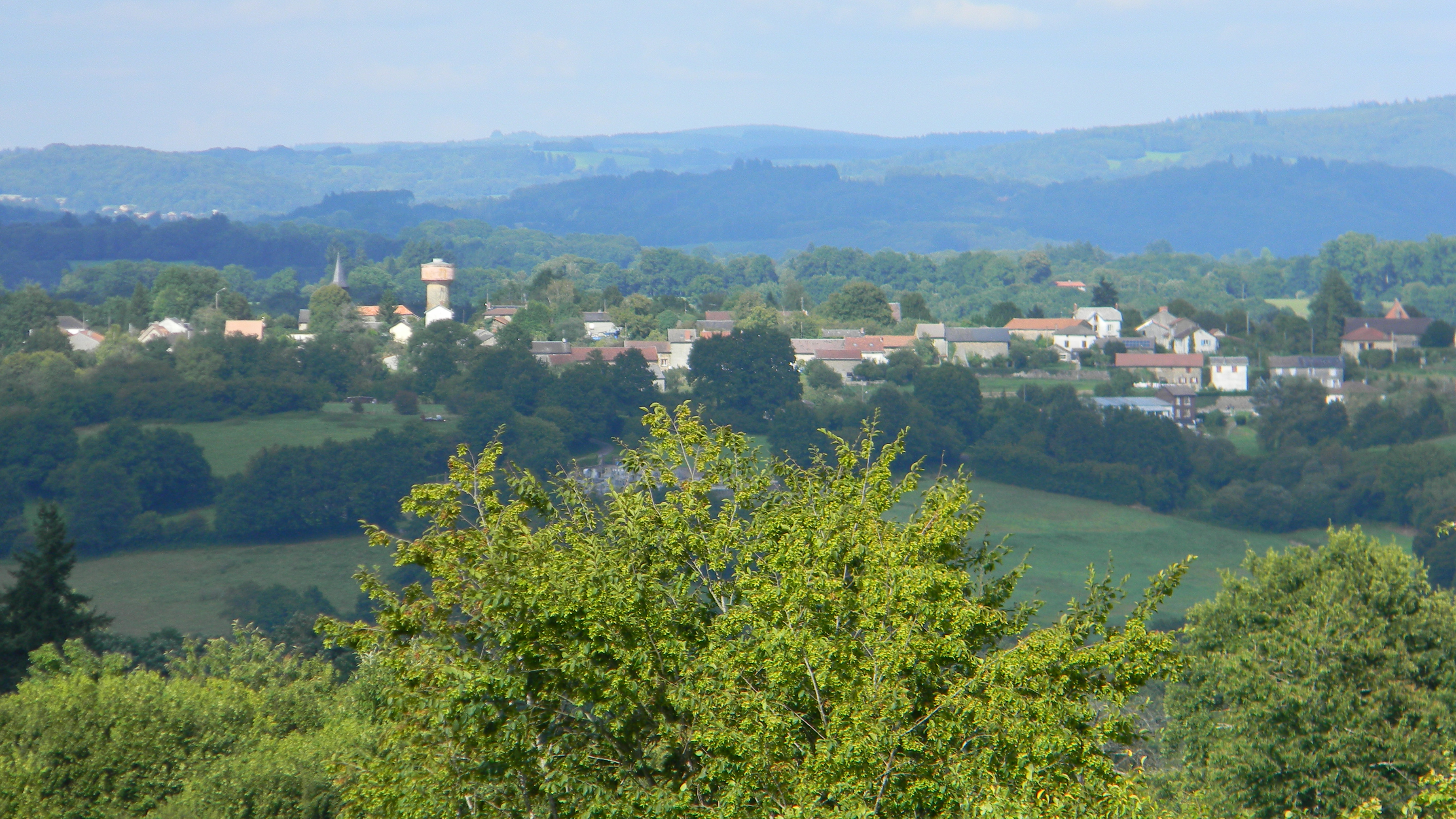 Vue générale du bourg de Masléon prise des hauteurs de celui de Roziers-Saint-Georges